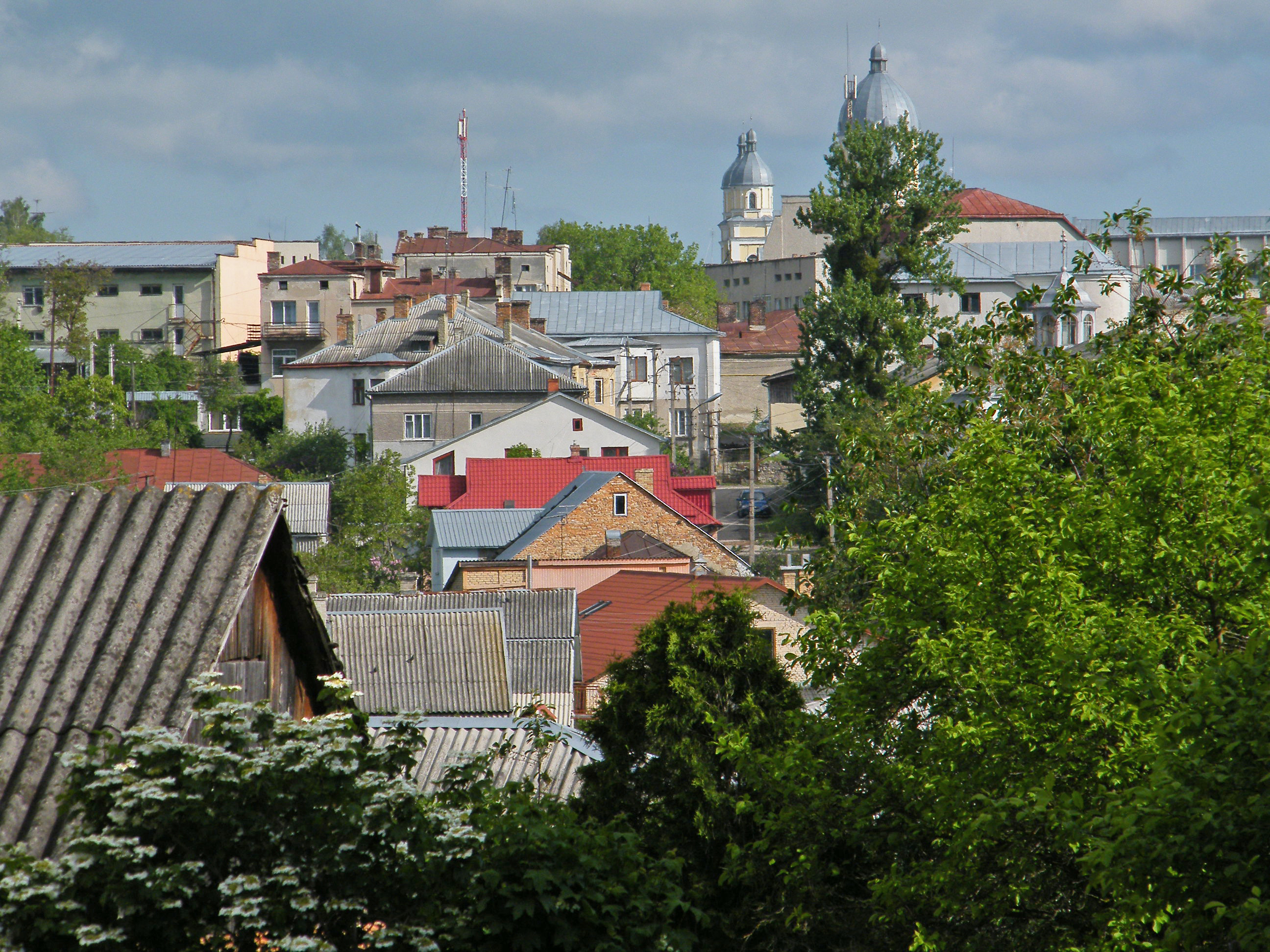 Вид на город